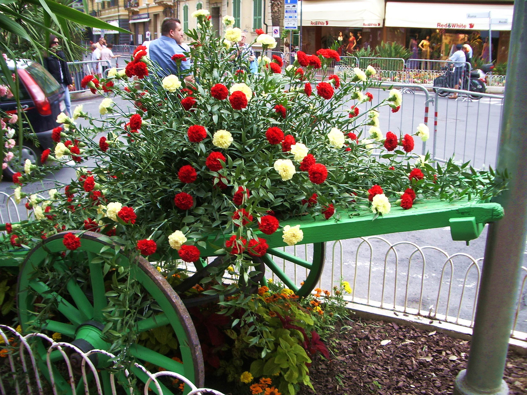 Decorazione florale all'incrocio di una via di Ventimiglia, in Liguria, Italia.